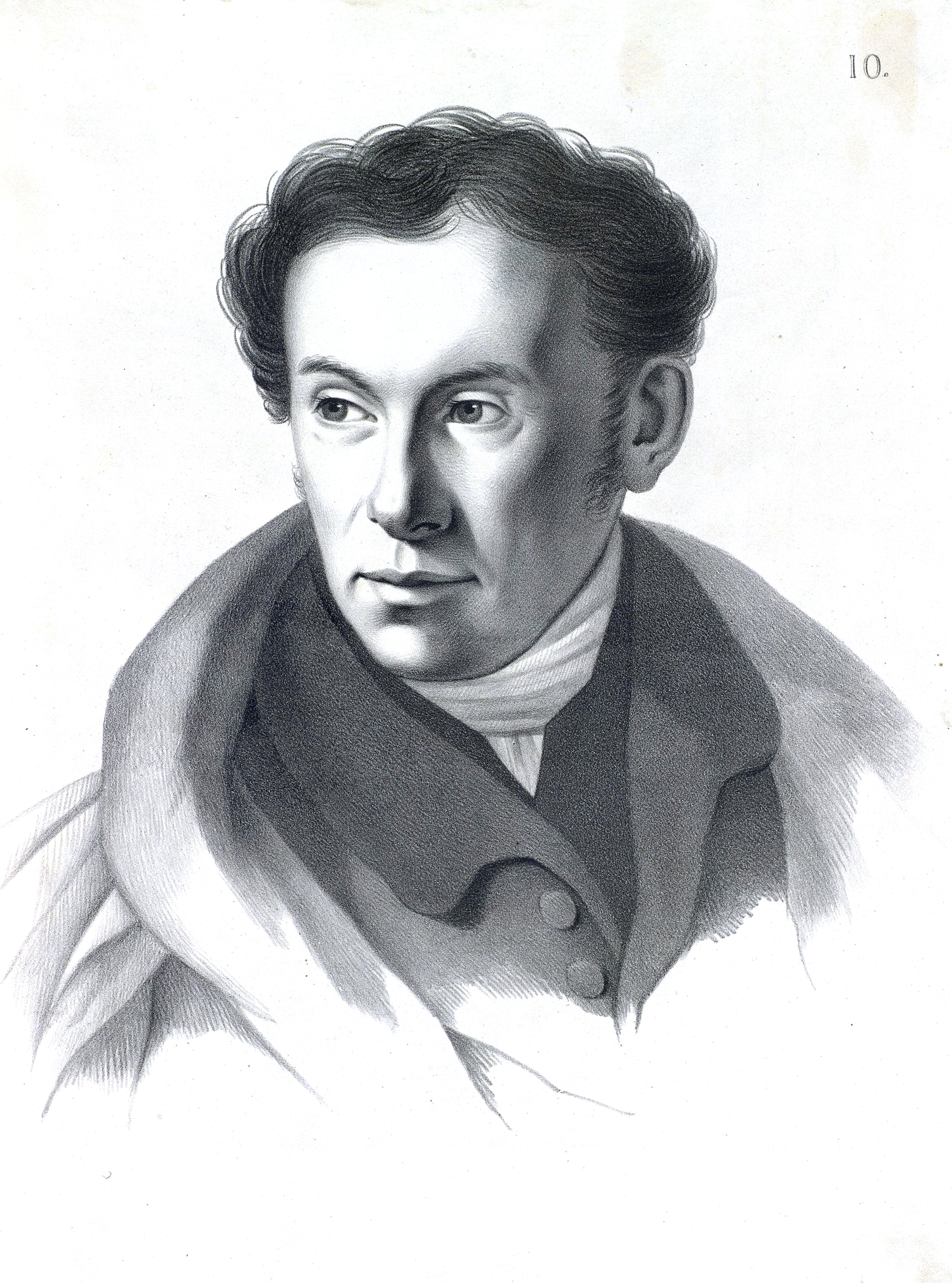 Жуковский, Василий Андреевич